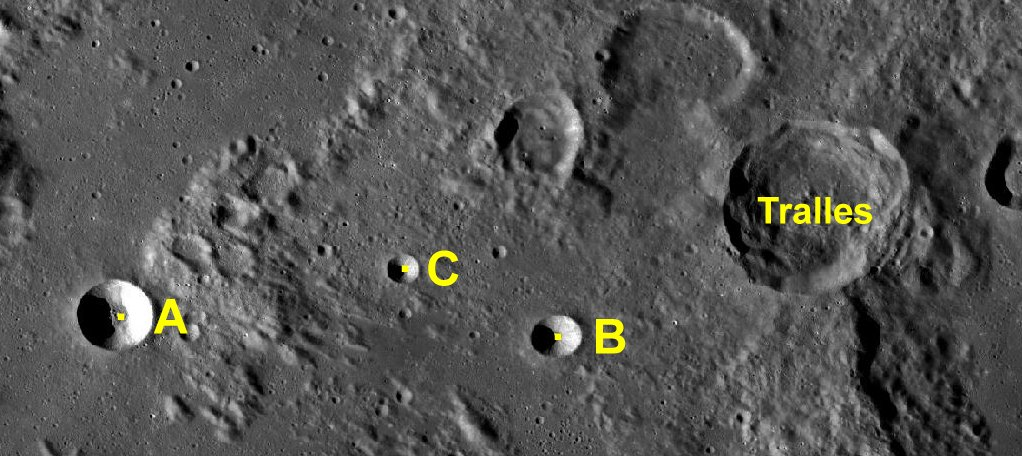 Cráter Tralles. Cráteres satélite. (Imagen LRO)